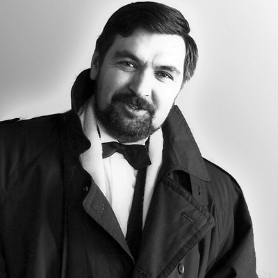 Фото Галины Кмит